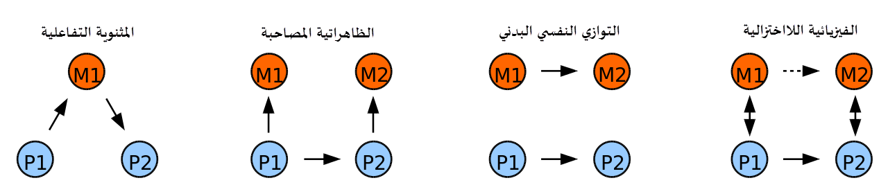 فلسفة العقل